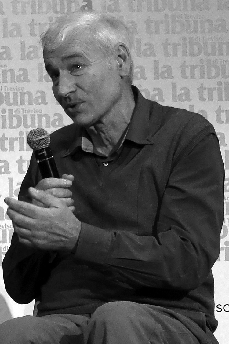 Luciano Cecchinel